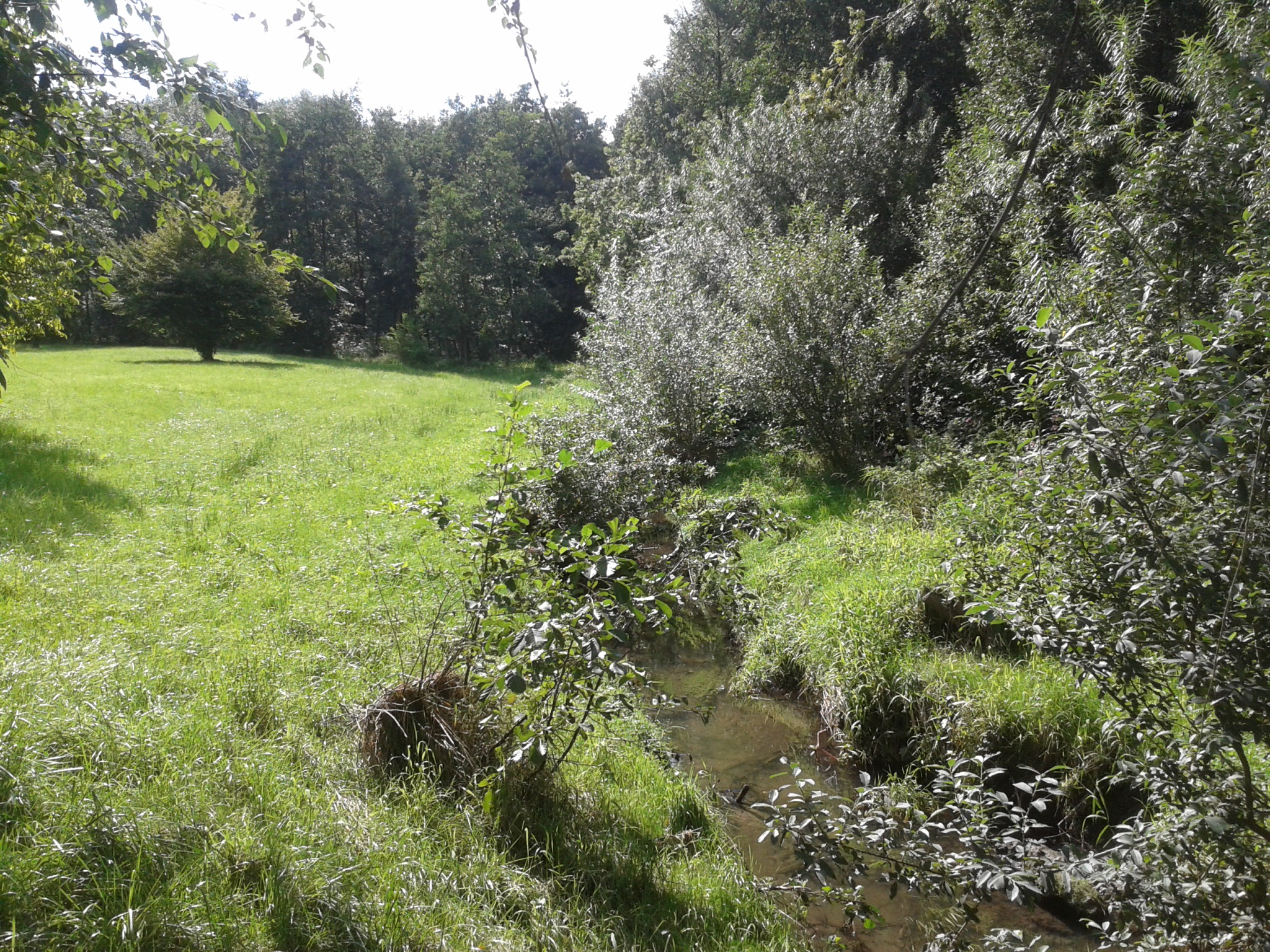 Gellershagener Bach im Bultkamp-Grünzug